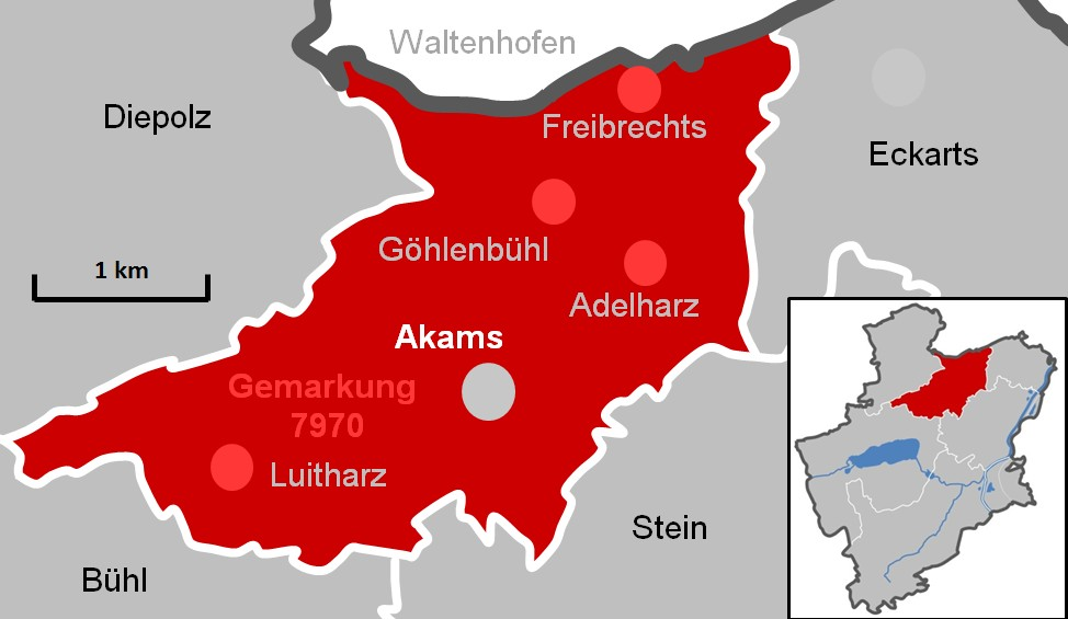 Immenstadt Gemarkung 7970 Akams (erstellt mit MS-Excel)